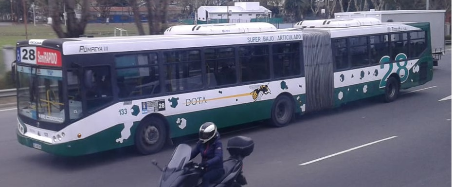 Ómnibus articulado de la línea 28, transitando la Avenida Lugones.